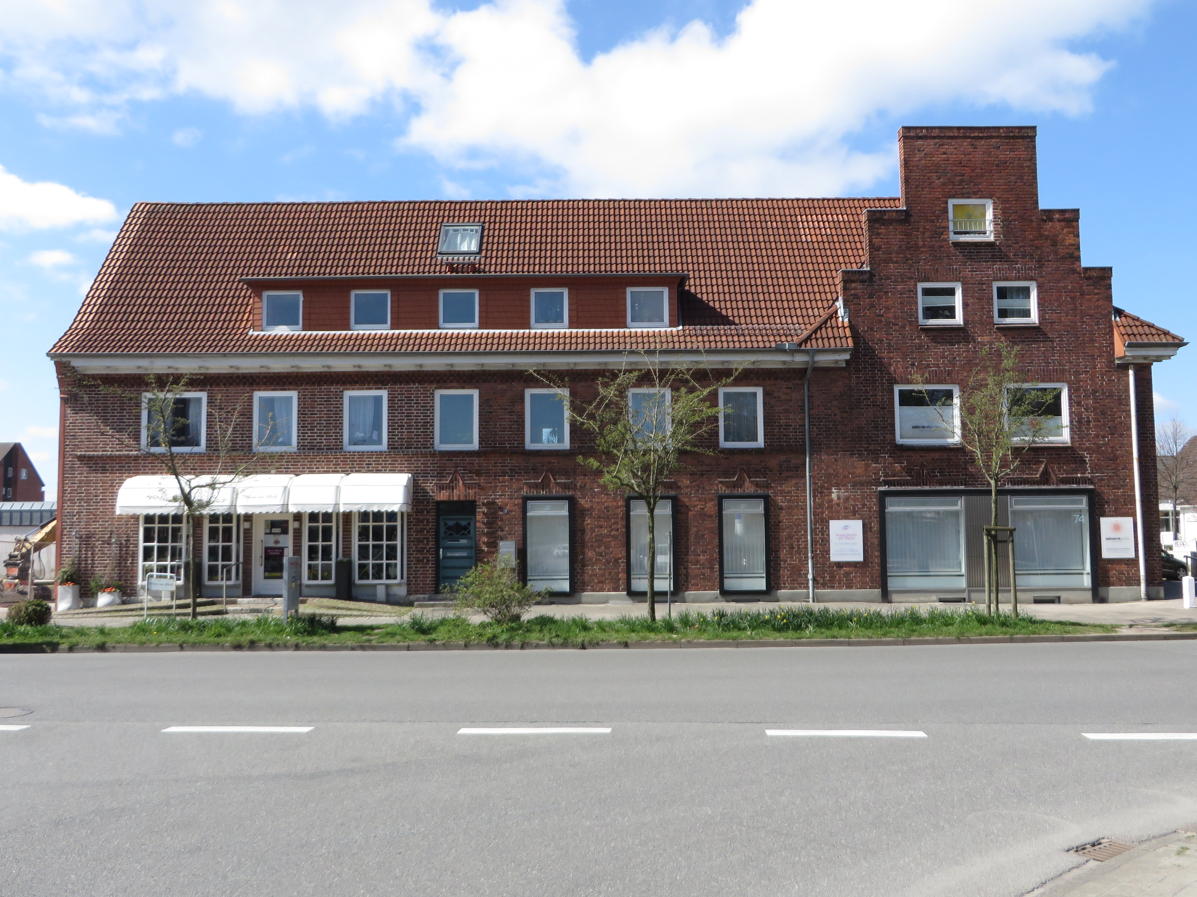 Eckhaus Friedheim 2 und Fördestraße 74 am Twedter Plack (April 2015), Bild 01